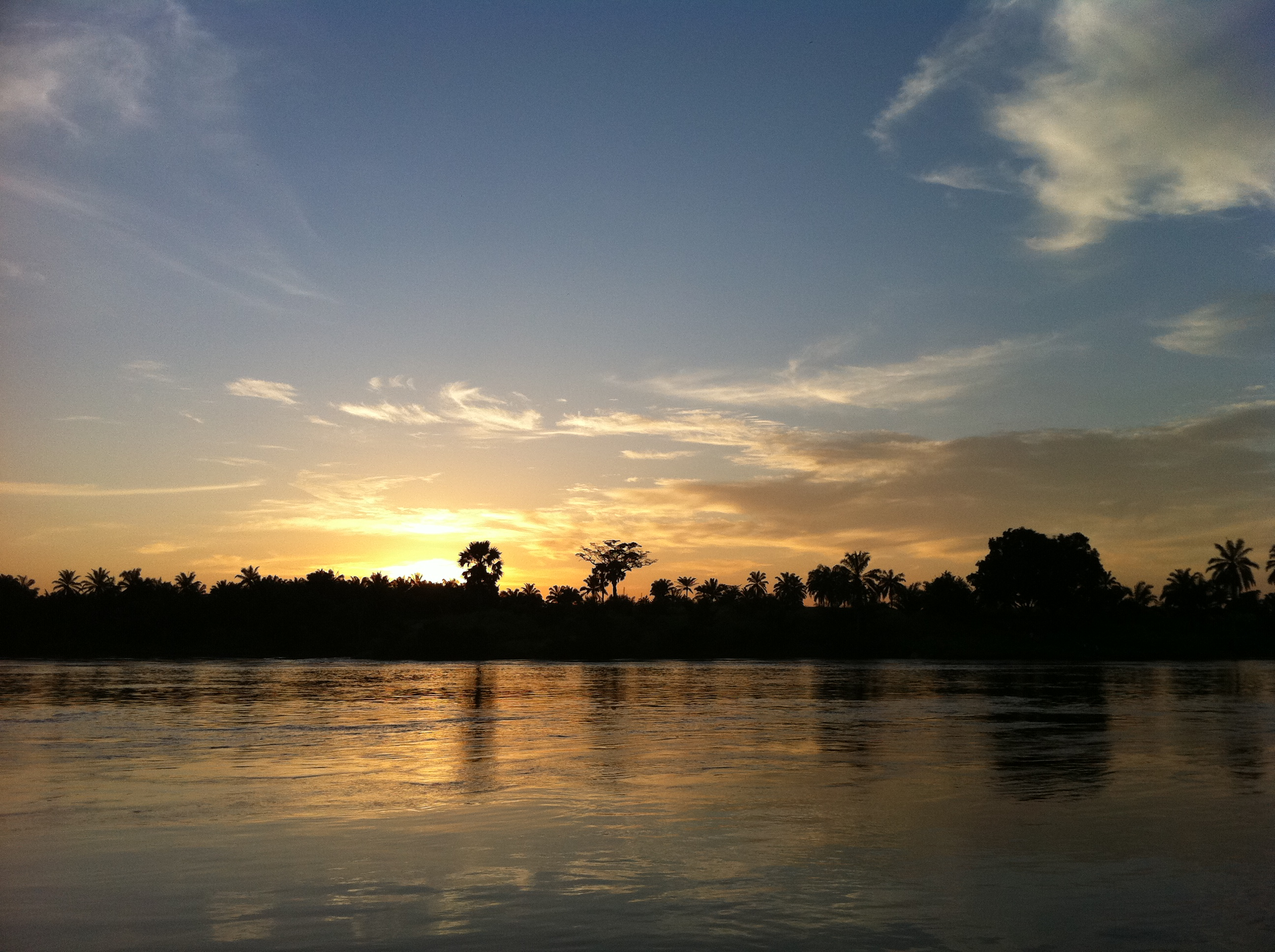 Sunset view from Kalonda. Kasai near Tshikapa